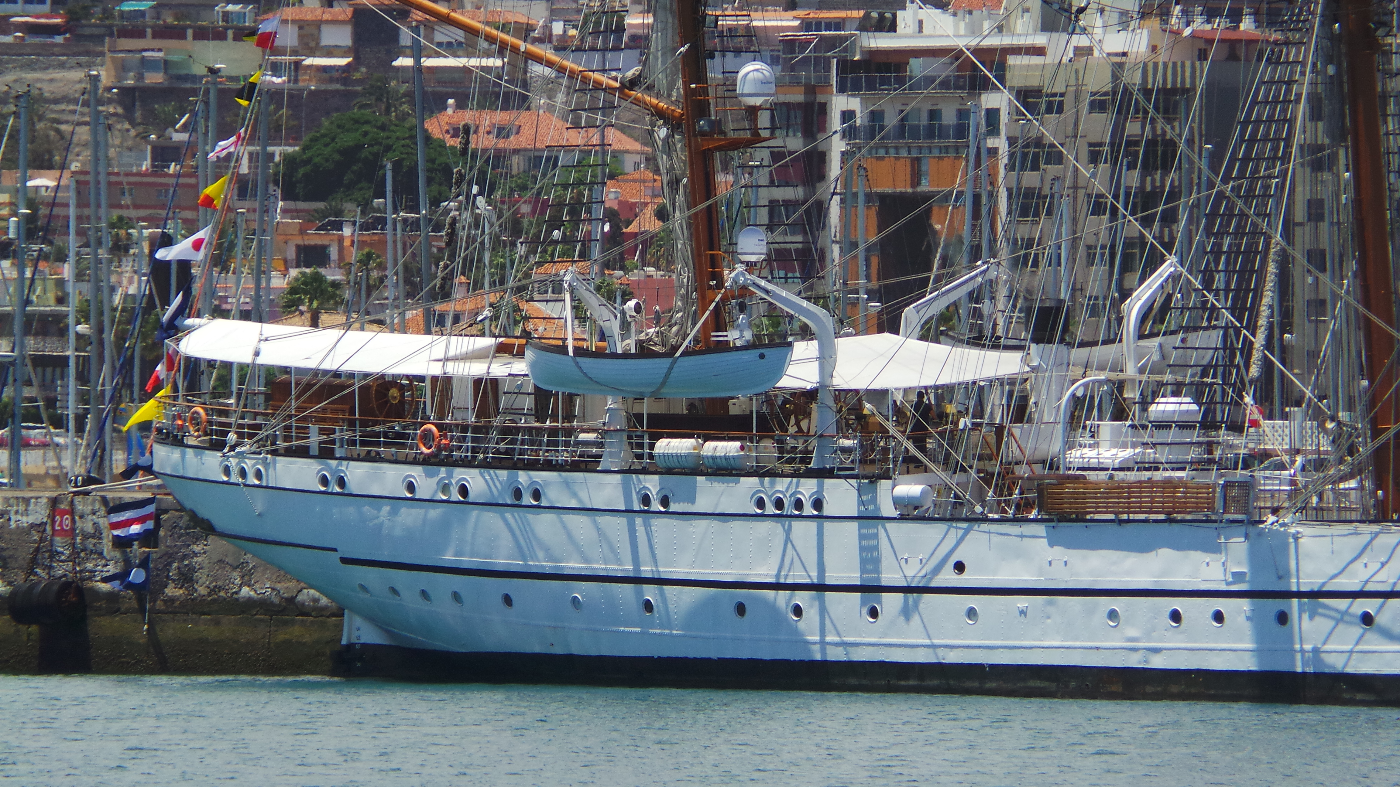 Visita al Buque Escuela NRP Sagres, en La Base Naval de Las Palmas de Gran Canaria. Este fin de semana de semana ( 20, 21 y 22 de junio de 2014) tenemos la oportunidad de disfrutar, en Las Palmas de Gran Canaria, de la visita del buque escuela portugués NRP Sagres, se encuentra atracado en el muelle de la base naval y podrá ser visitado hoy viernes hasta las 19h y mañana sábado de 10 a 12h y de 14 a 19h . El Buque proveniente de Lisboa partirá el domingo hasta Las Azores , para luego regresar a Lisboa, cuenta con unos 60 guardiamarines, con una decena de mujeres entre ellos, que realizan su periodo de instruccion Construido en 1937 en Hamburgo y tras varios avatares, fue adquirido en 1961 por la marina Portuguesa para sustituir al Sagres II, entrando en servicio como Sagres III en febrero de 1962. Tiene 89,5 metros de eslora, 12 de manga y 5,5 de calado, siendo su altura máxima de 45,5 metros. Cuenta además con 1.971 metros cuadrados de vela y desplaza 1.893 toneladas. La figura del mascarón de proa del Sagres III es el Infante D. Henrique nacido el 4 de marzo de 1394, siendo uno de los impulsores de la expansión y descubrimientos portugueses de la época. Más información del Buque : Web del Buque